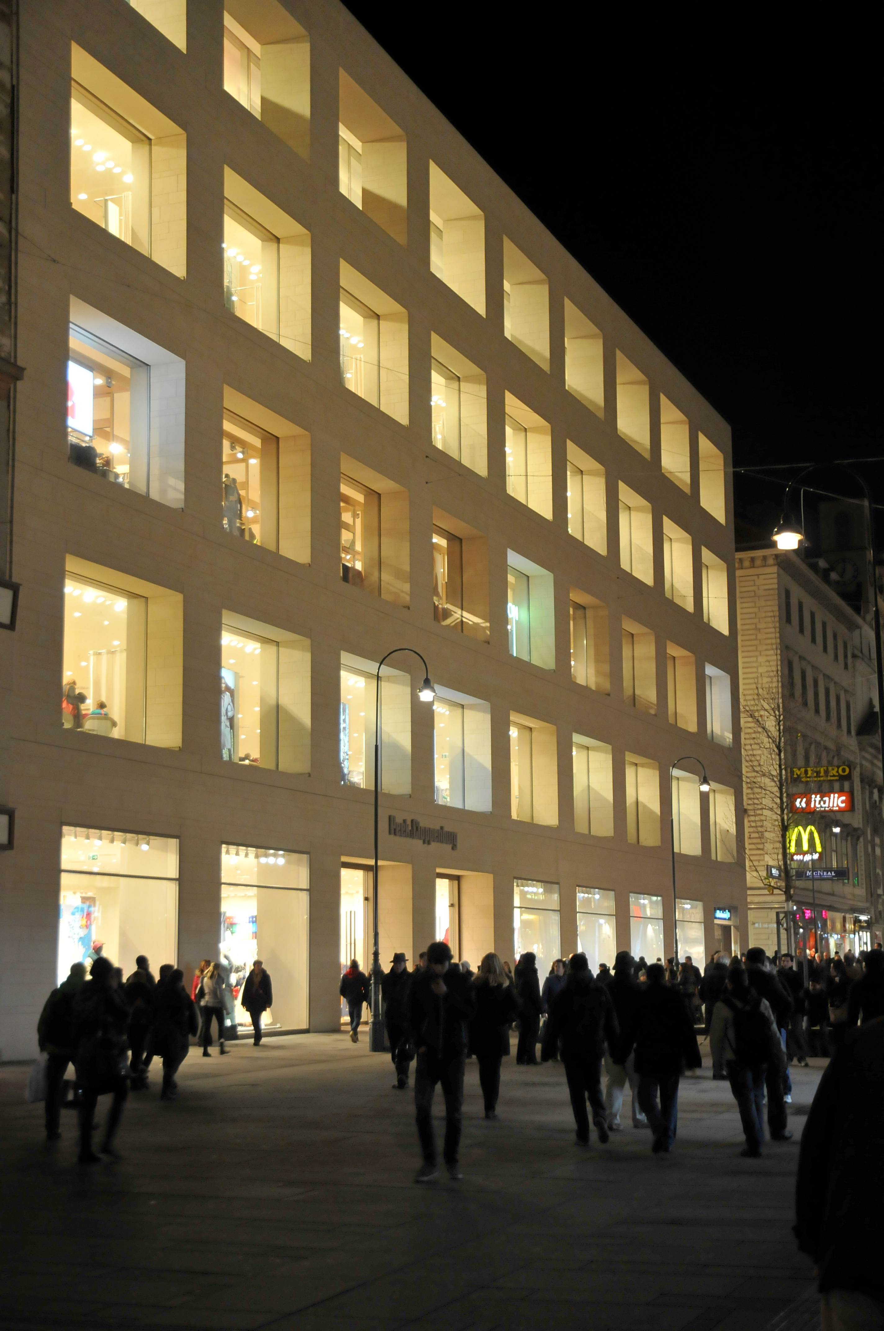 Kärntner Straße Nr.29: Die Peek & Cloppenburg KG Wien führt 37 Standorte in Österreich, Polen, Kroatien, Slowakei, Slowenien, Tschechien, Ungarn, Rumänien, Bulgarien, Lettland und Litauen. Das "Weltstadthaus" auf der Kärntner Straße wurde 2011 von David Chipperfield erbaut.